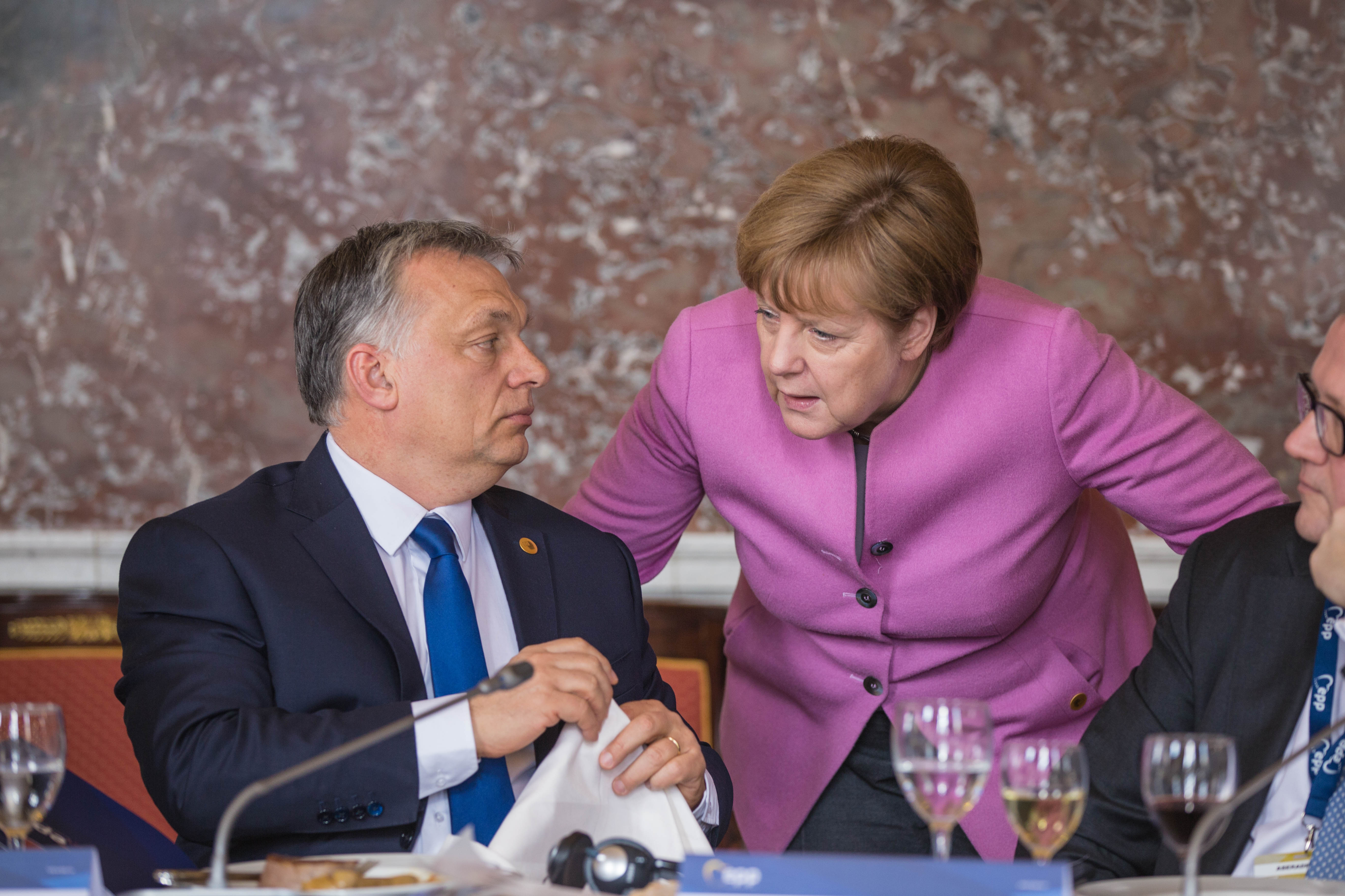 EPP Summit, Brussels, March 2017